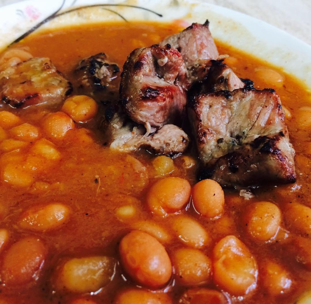 غذای خوشمزه شمالی